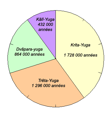 Graphe des durées des yugas dans la mesure védique du temps